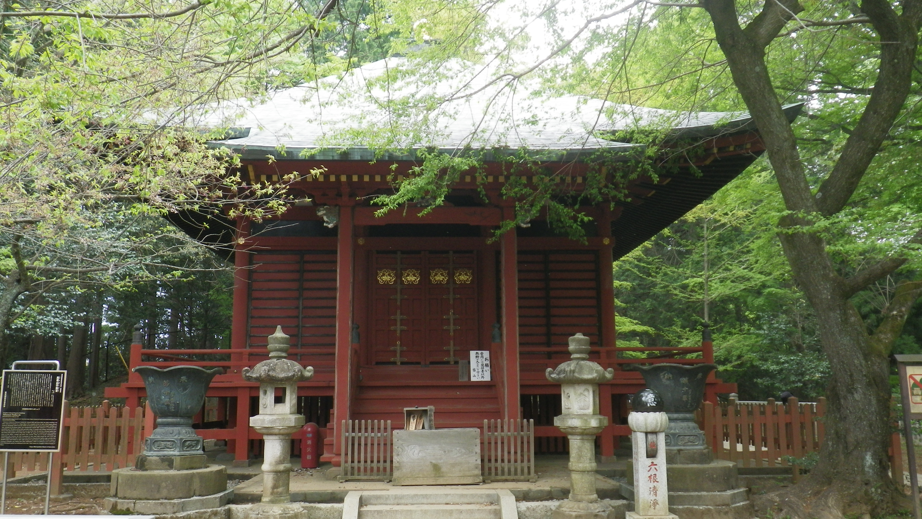 高尾山薬王院 不動堂